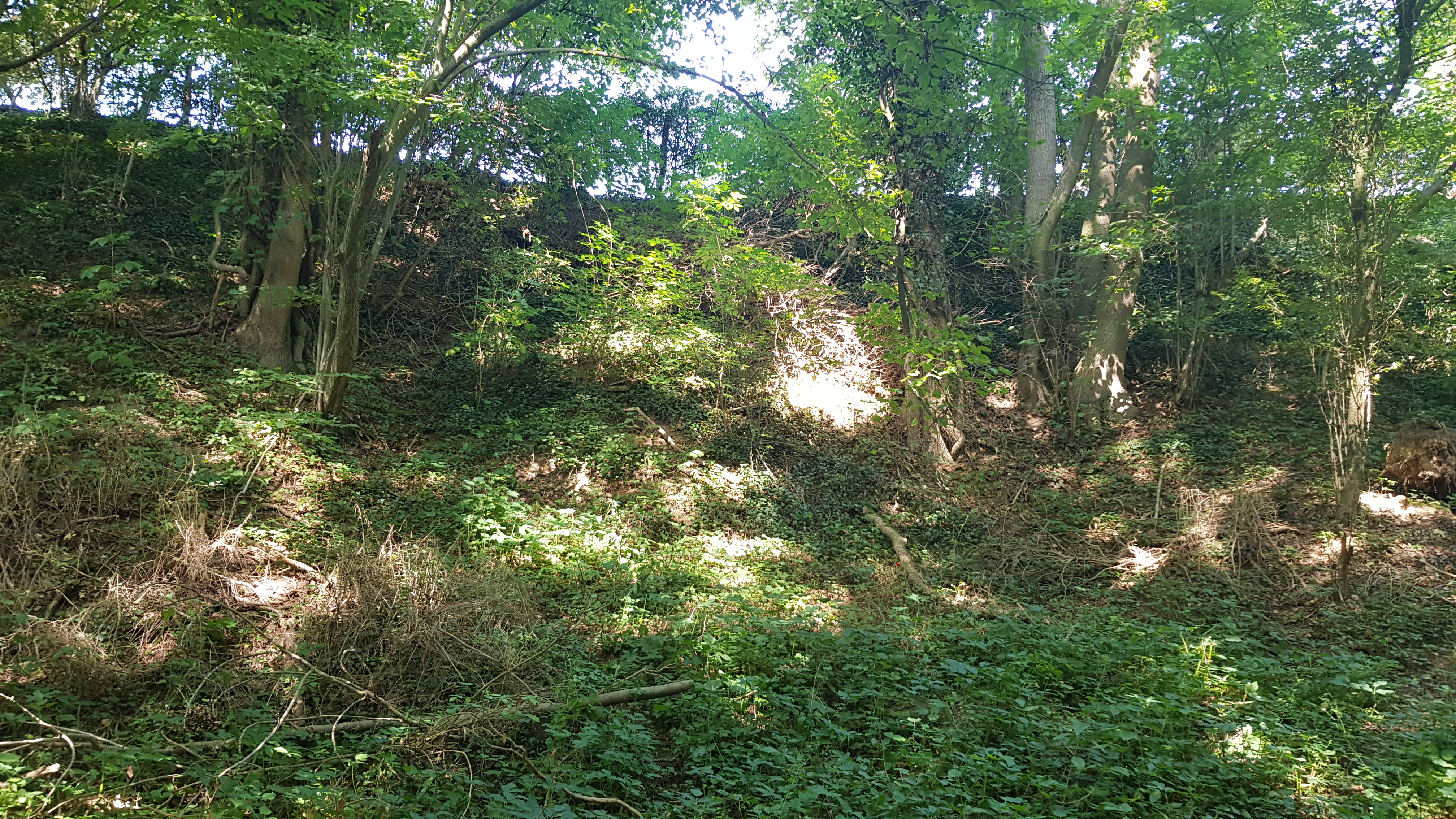 Scheuldergroeve II, Scheulder, Nederland